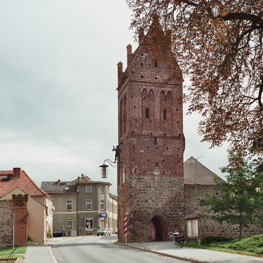 Berliner Tor in Müncheberg, Deutschland